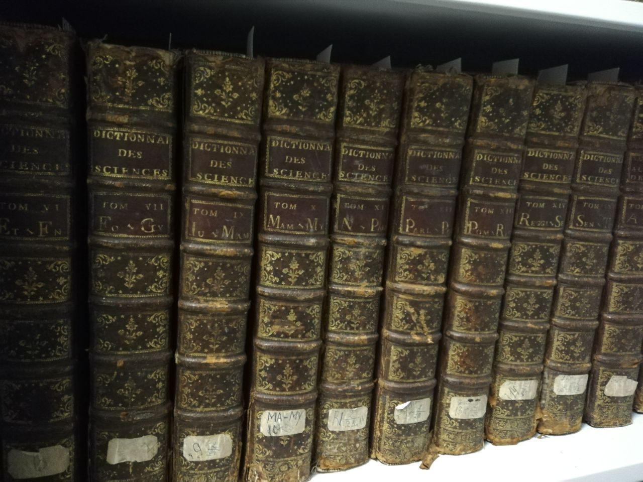 Энциклопедия Даламбера и Дидро в коллекции библиотеки Политехнического музея